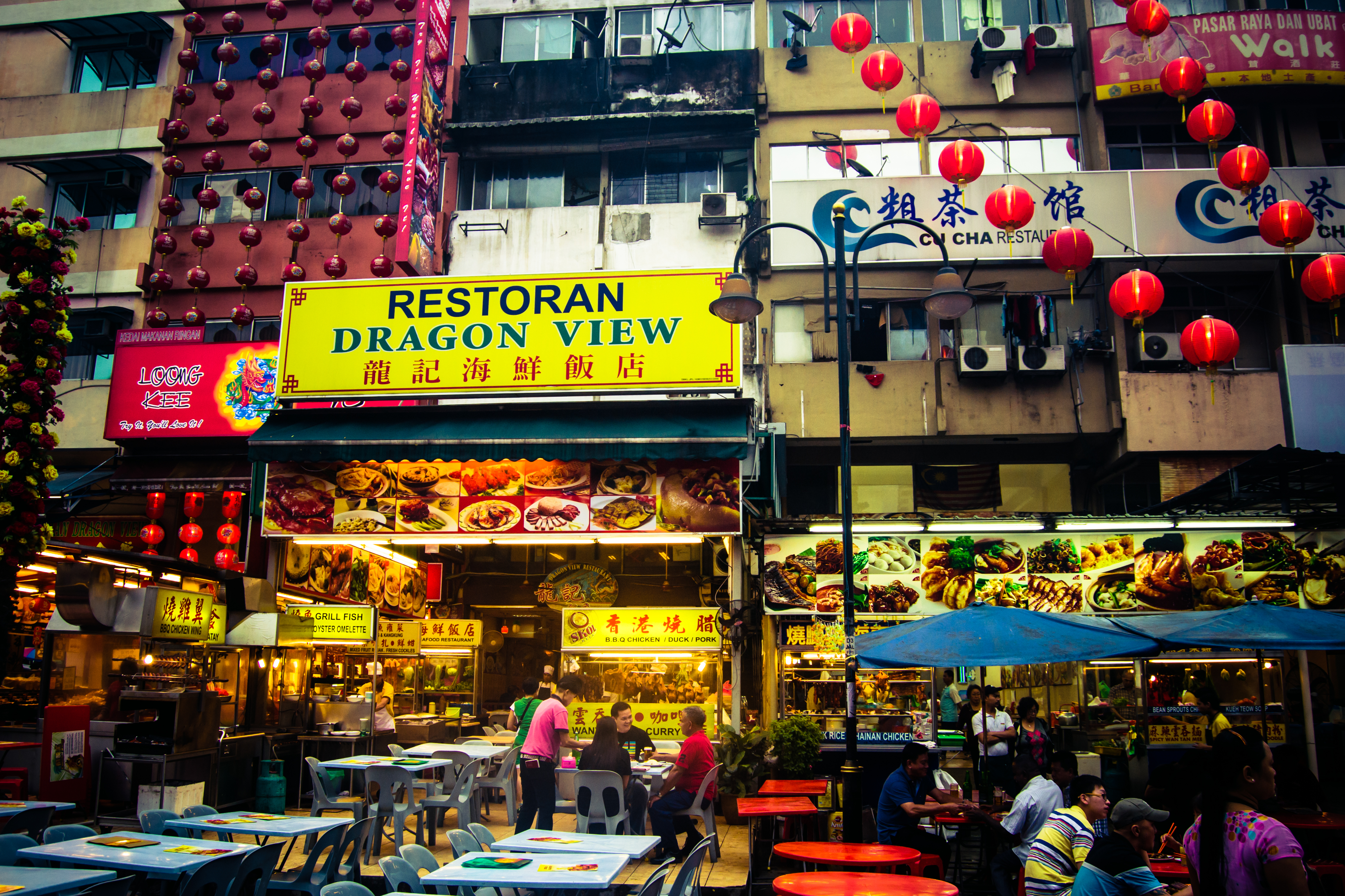 Jalan Alor Street View